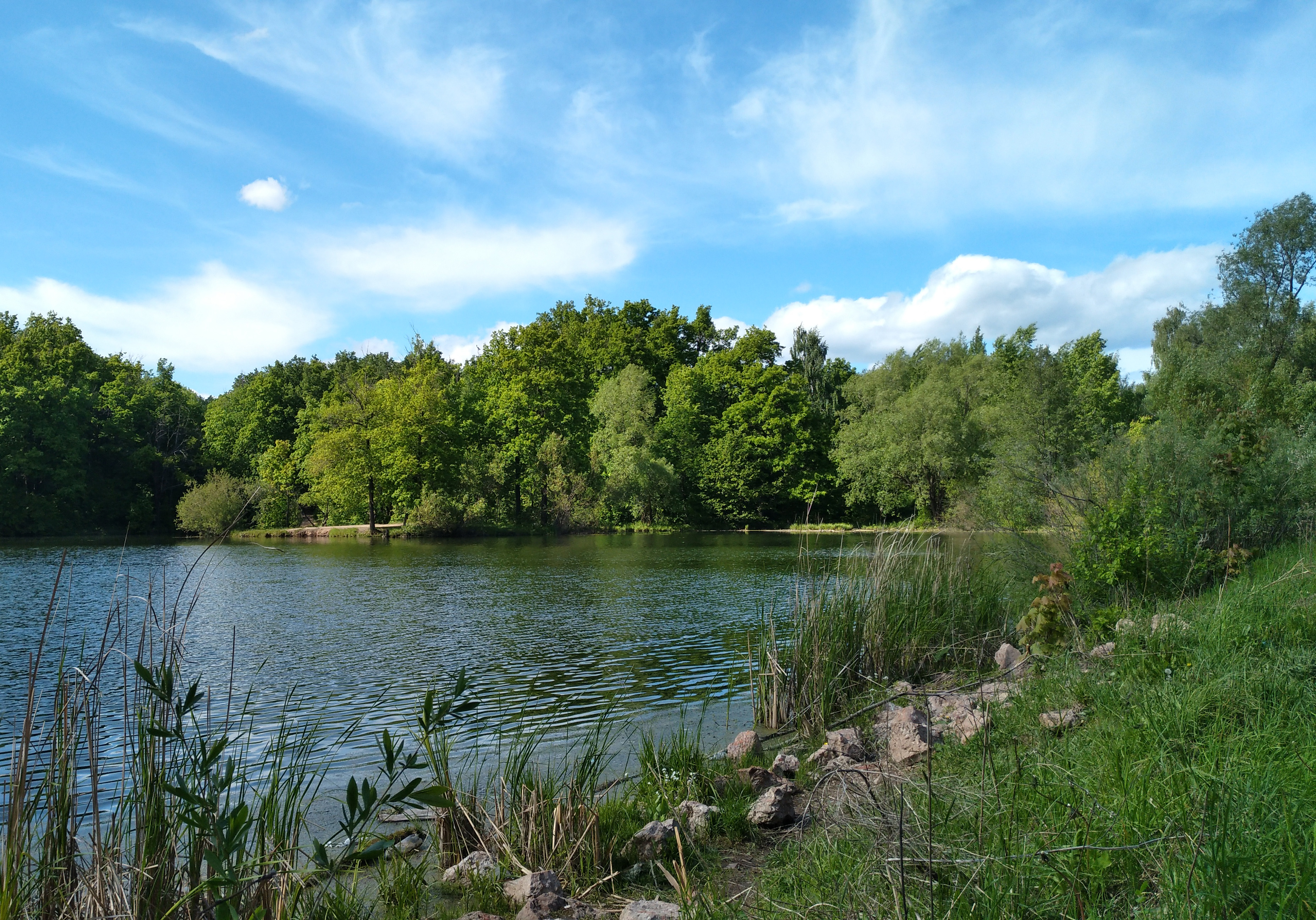 Чебоксарский филиал Главного ботанического сада им. Н.В. Цицина: Расположен вдоль речки Кукшумка в г. Чебоксары; вход в ботанический сад — со стороны проспекта И. Яковлева, Чебоксары, Чувашия This image is related to the protected area of Russia number 2100057